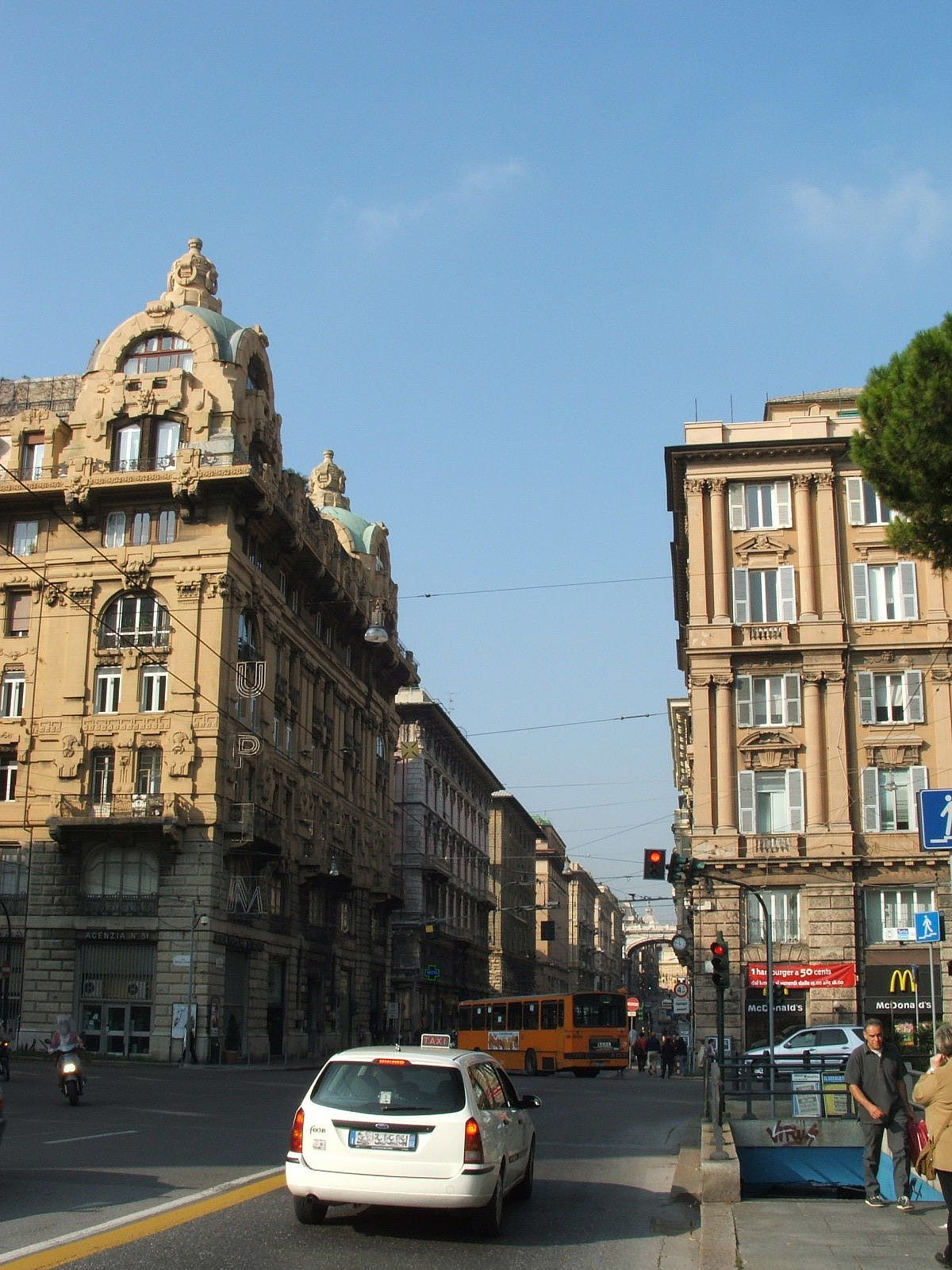 Genova, Via XX Settembre (da piazza della Vittoria)